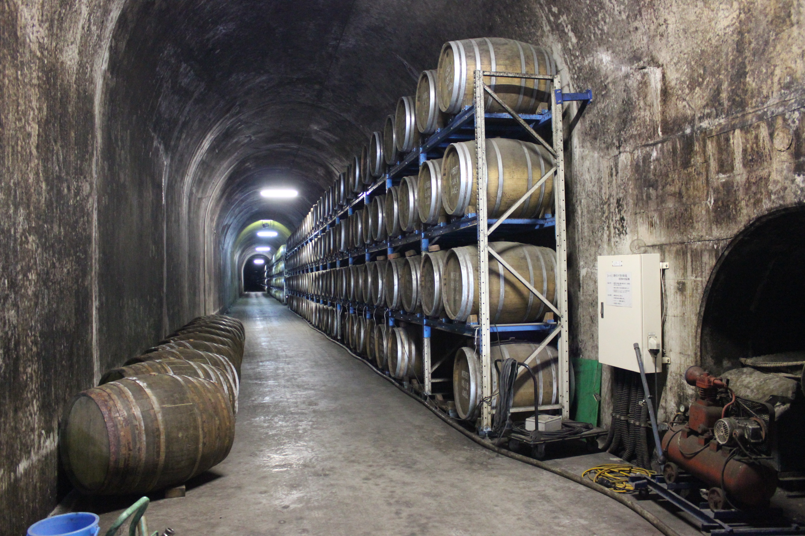 神楽酒造高千穂観光物産館トンネルの駅のトンネル貯蔵庫（葛原トンネル）内部